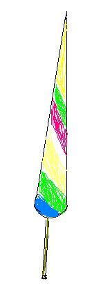 Self-made by alphabravotango.